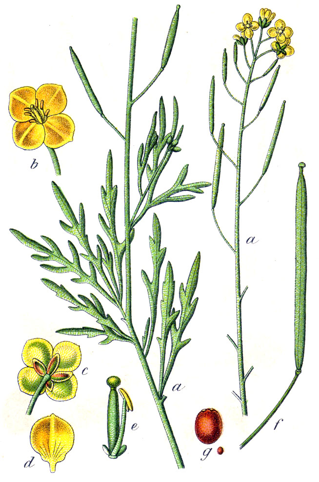 Diplotaxis tenuifolia (L.) DC., syn. Crucifera tenuifolia E.H.L.Krause Original Caption Feine Rauke, Crucifera tenuifolia